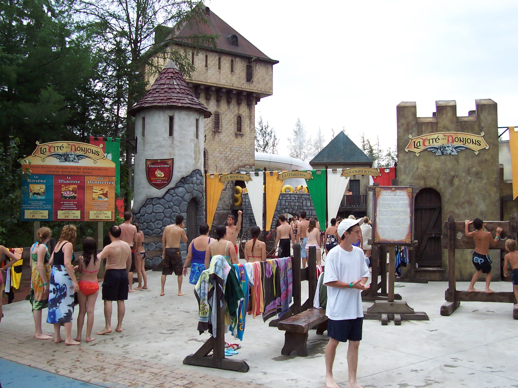 Village Vacances Valcartier, Quebec, Canada - Entrée de la rivière d'aventure la Cité des Donjons / Entryway to the "Dungeon City" adventure river